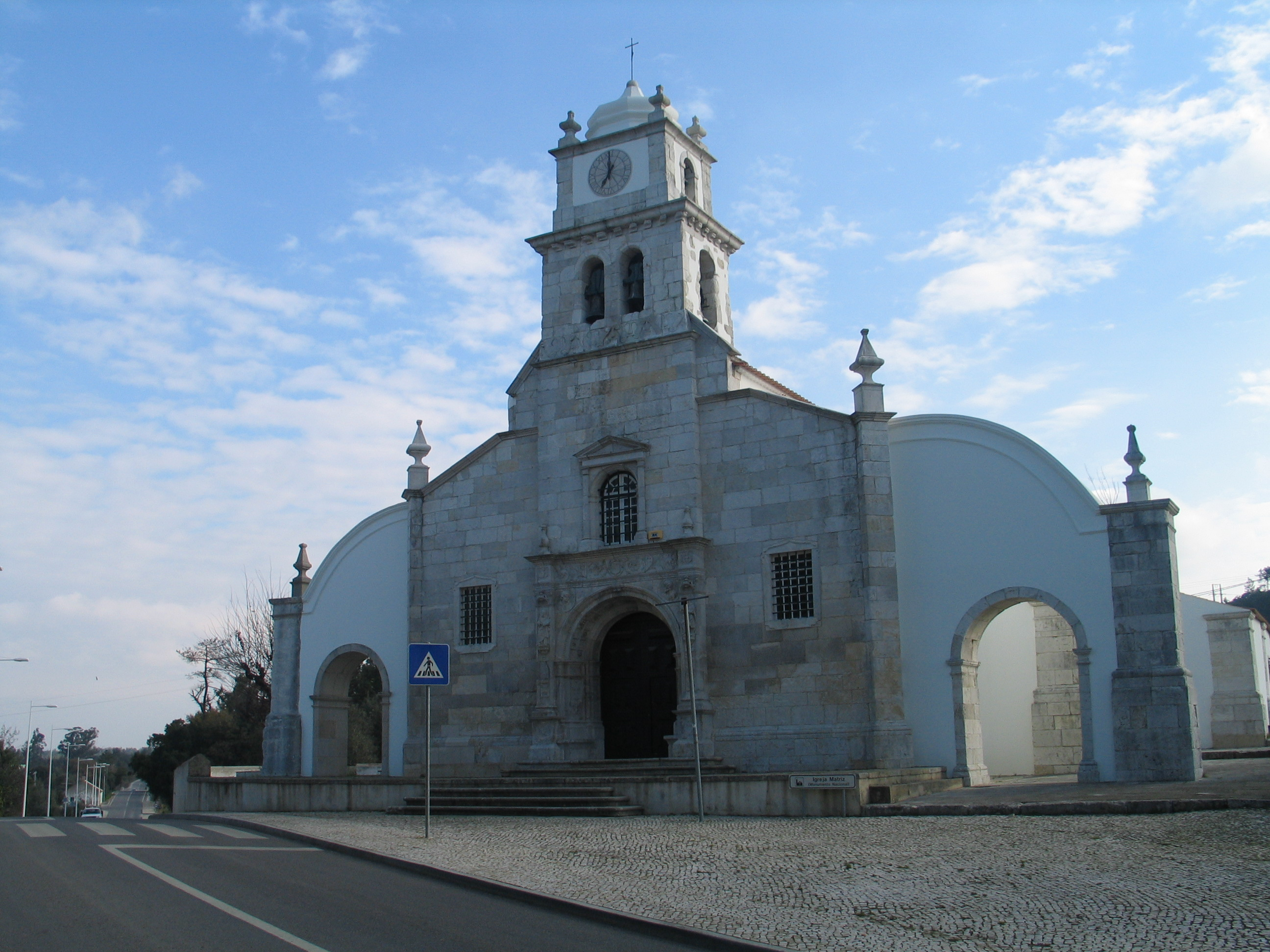 Church of Atalaia (Vila Nova da Barquinha, Portugal)